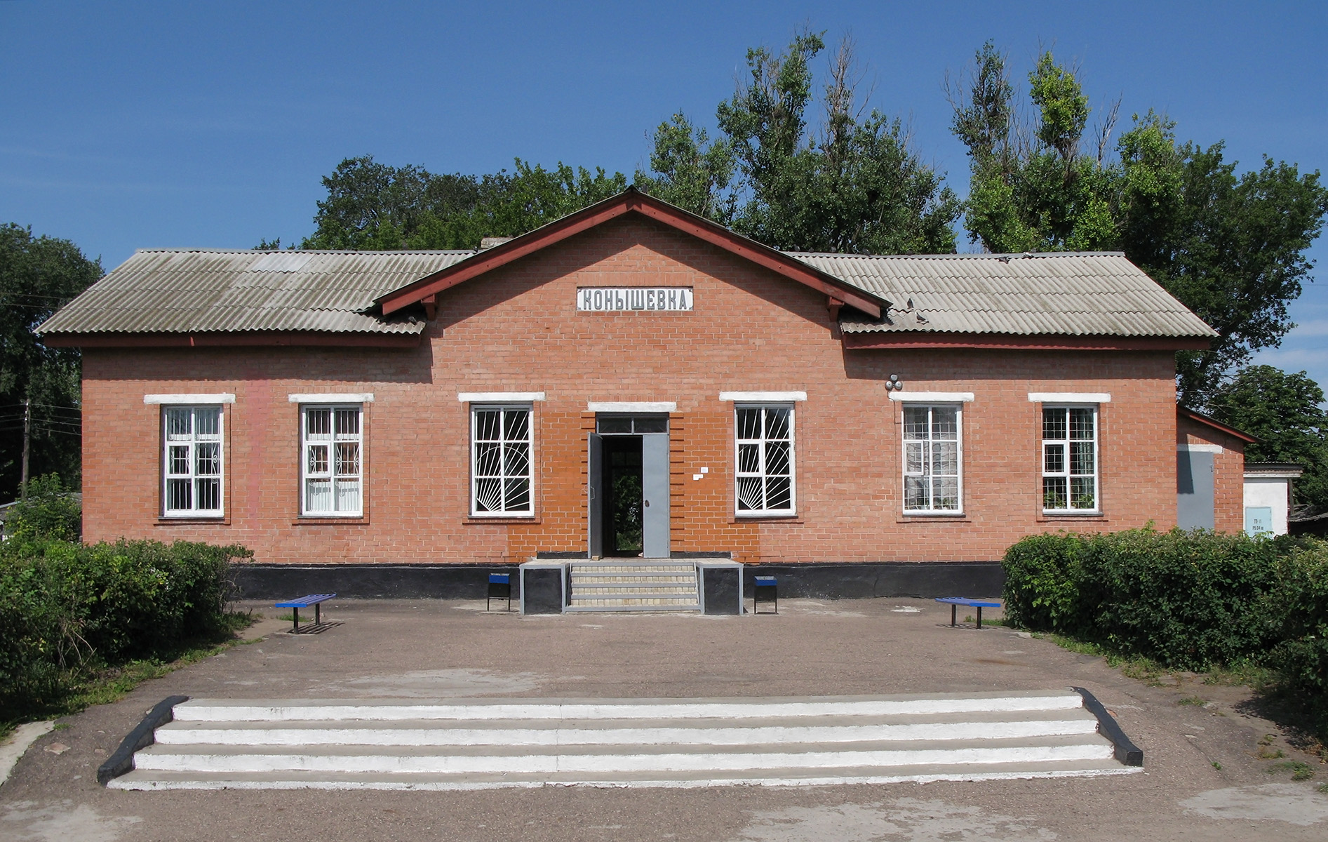 Вокзал ст. Конышевка